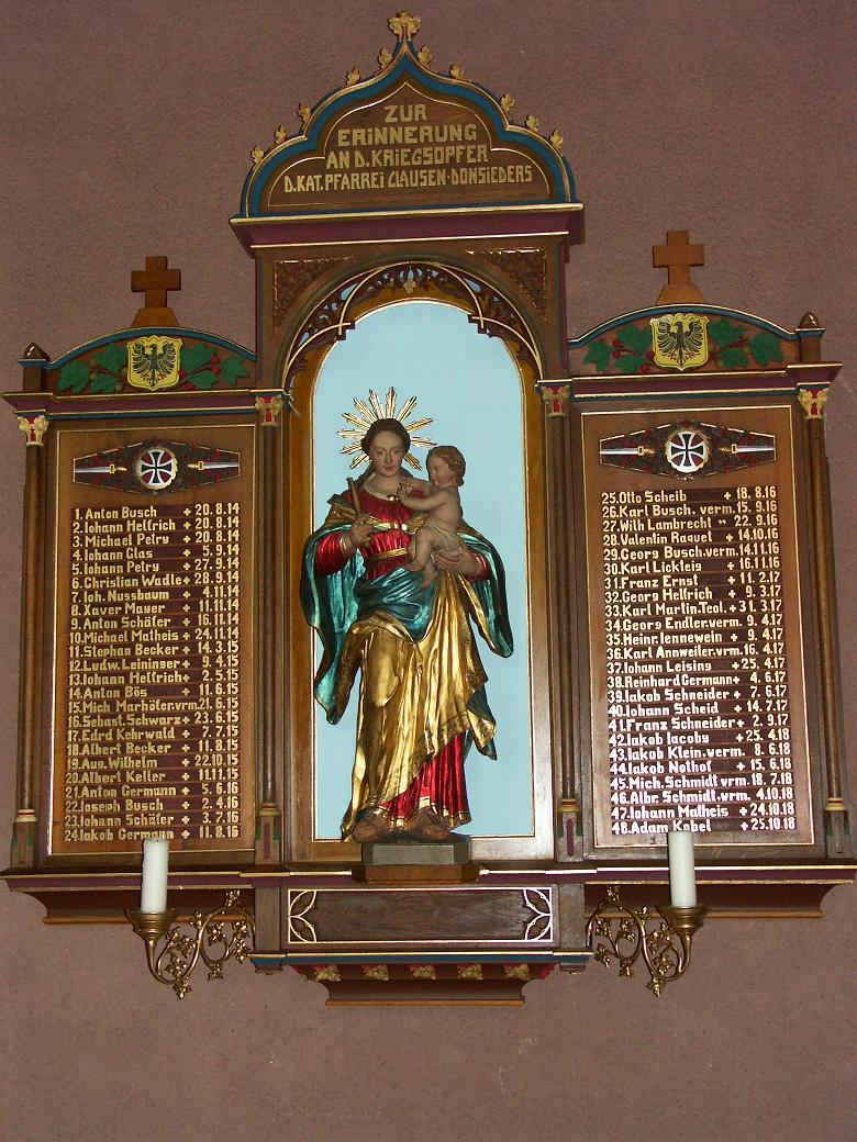 War Memorial - Krieger-/Kriegsopferdenkmal - Mémorial de guerre 1914/1918